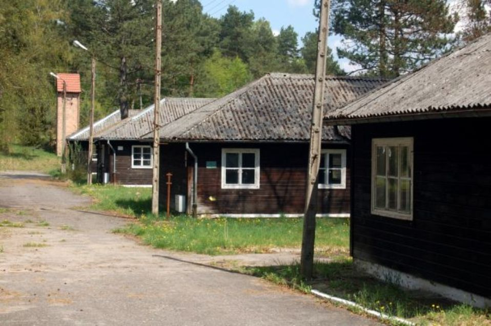 Złocieniec Budów. Drewniane baraki, gdzie kwaterował 8 batalion rozpoznawczy do 1981